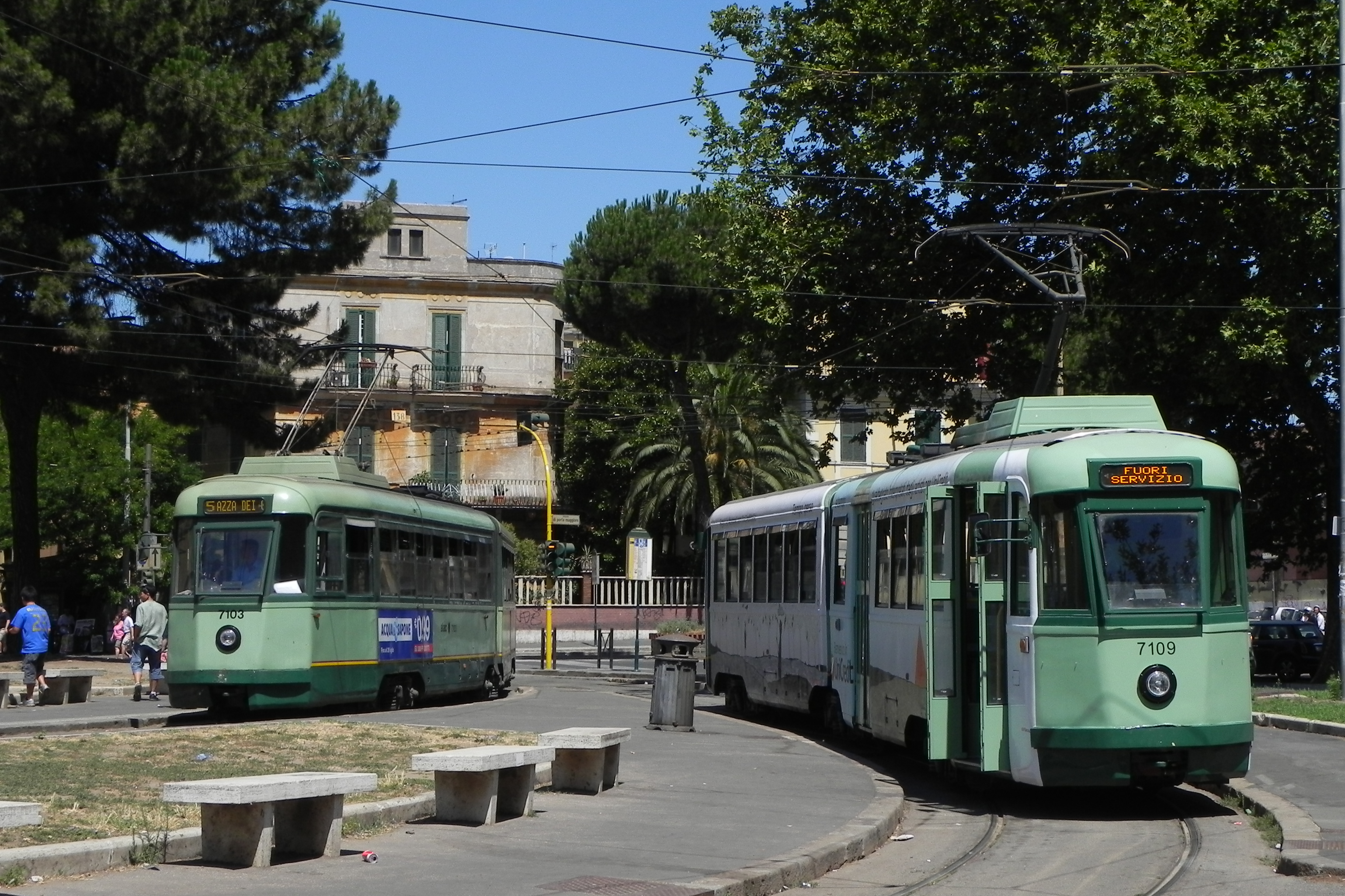 Incontro di Tram TAS Stanga ex STEFER, matricole 7103 (con l'archetto) e 7109 (col pantografo monobraccio) a piazza di Porta Maggiore, a Roma